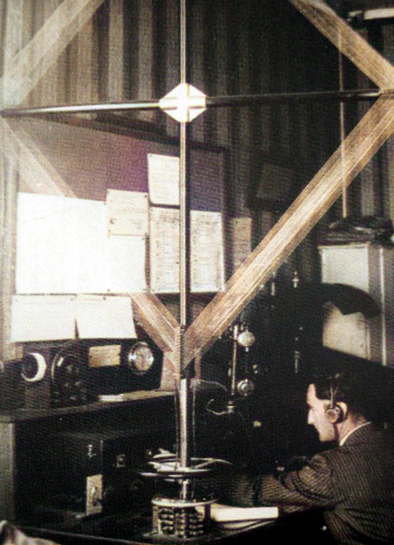 station radio goniométrique. Travaillait sur les fréquences: 333 kHz aéronautique désignée aussi par sa longueur d'onde de 900 mètres, 410 kHz fréquence normale de radiogoniométrie en radiotélégraphie morse positions des navires et des aéronefs a leurs demandes (depuis 1927), 500 kHZ désignée aussi par sa longueur d'onde de 600 mètres, détresse en mer. (666 kHz désignée aussi par sa longueur d'onde de 450 mètres radiogoniométrie en radiotélégraphie morse positions des navires et des aéronefs a leurs demandes jusqu'à 1927) , (1 MHz désignée aussi par sa longueur d'onde de 300 mètres des petits navires de 1906 jusqu'à 1927). 2182 kHz aussi par sa longueur d'onde de 137,5 mètres, détresse en mer (depuis 1947).